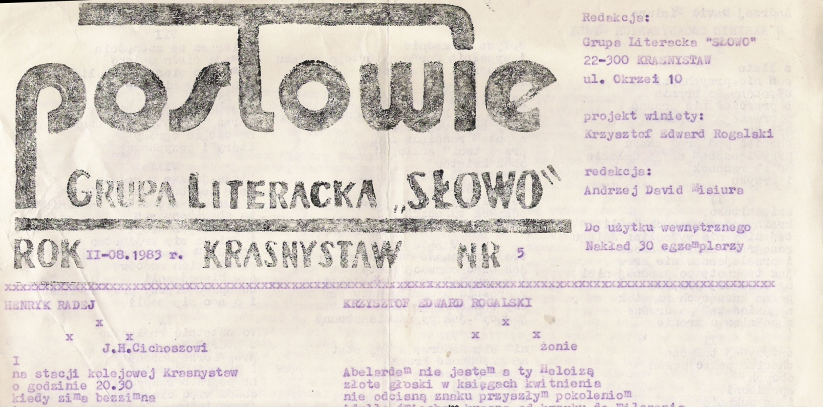 Winieta pisma "Posłowie" wydawanego przez grupę literacką "Słowo" w Krasnymstawie. Gipsoryt. Farba nanoszona była wałkiem, a odbitki odciskane były ręcznie - każda. Póżniej teksty pisane były na maszynie.